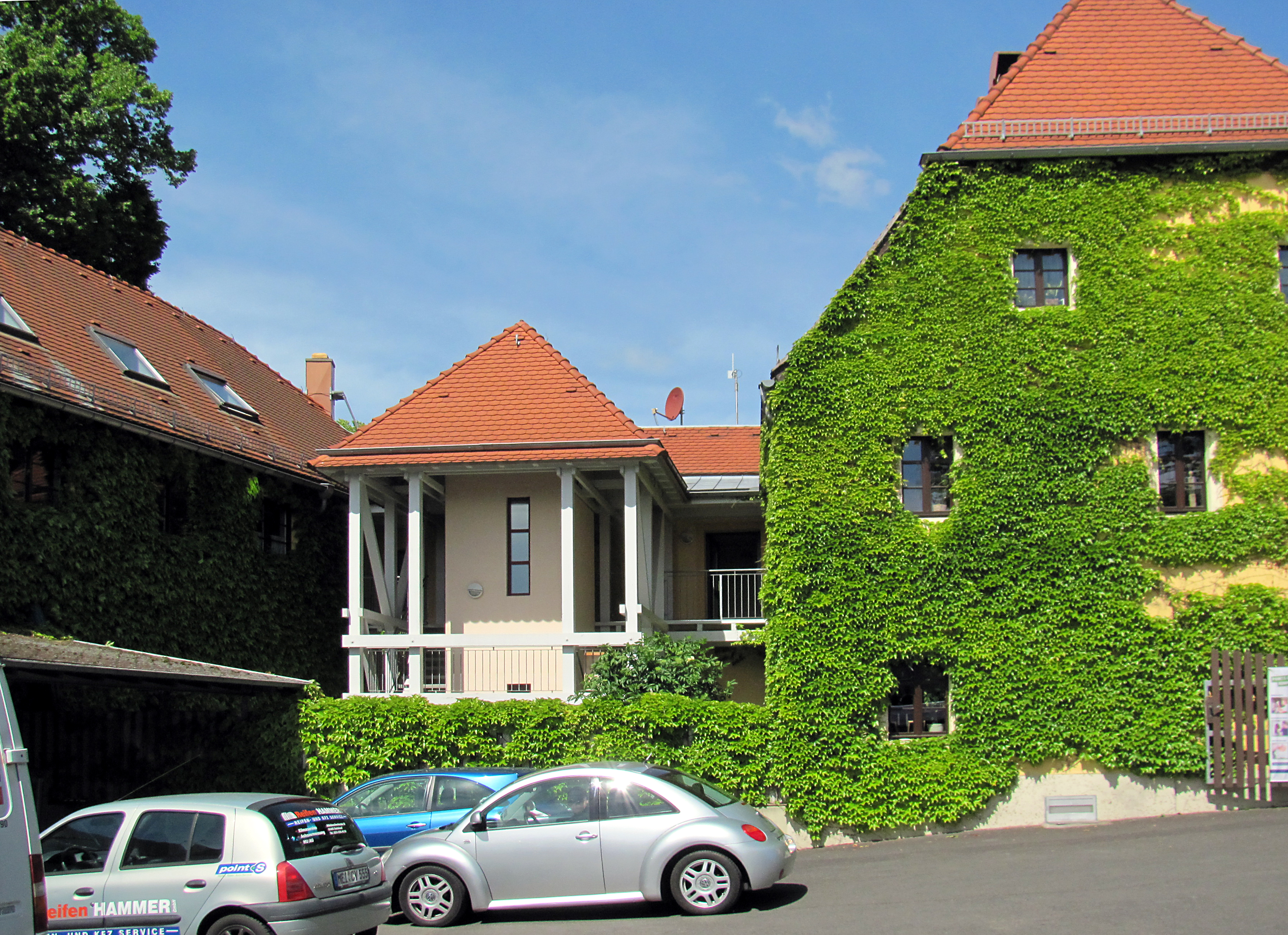 Radebeul-Kötzschenbroda, Rückseite der Oberschänke